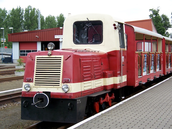 Diesellok 032